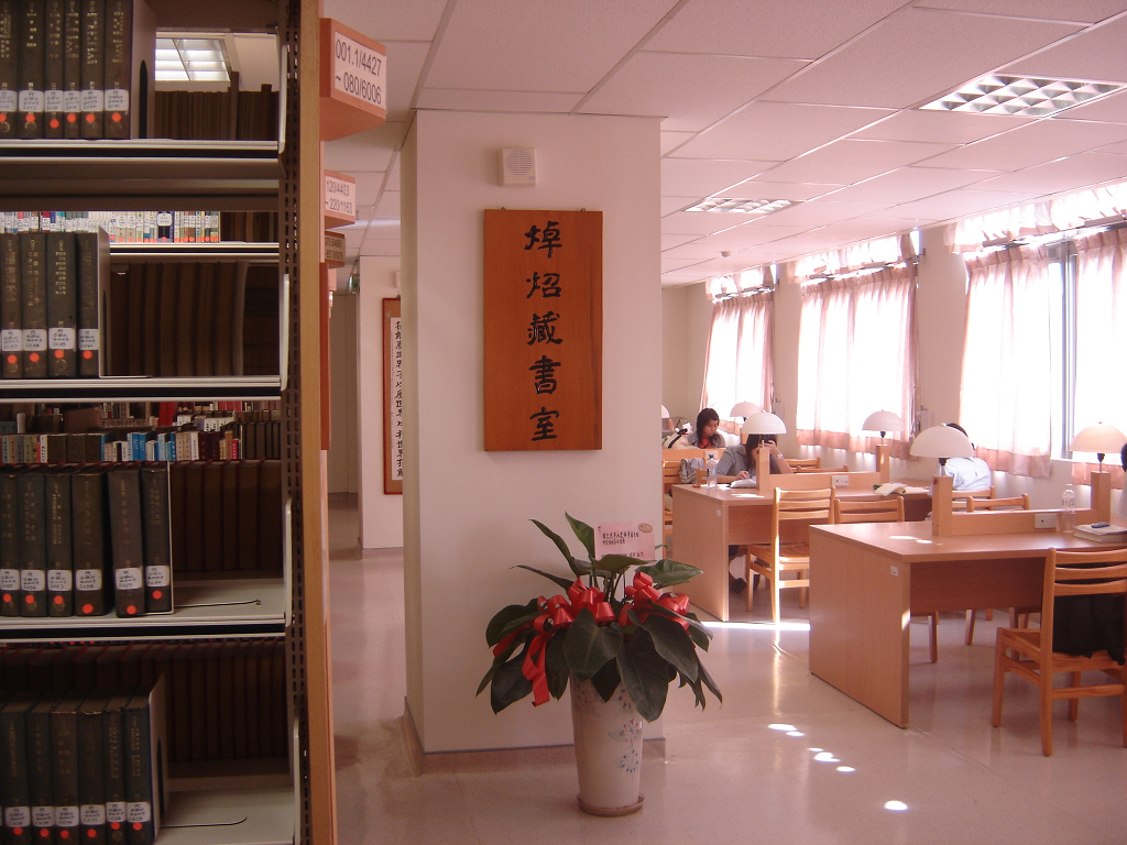 輔大人文科學圖書館